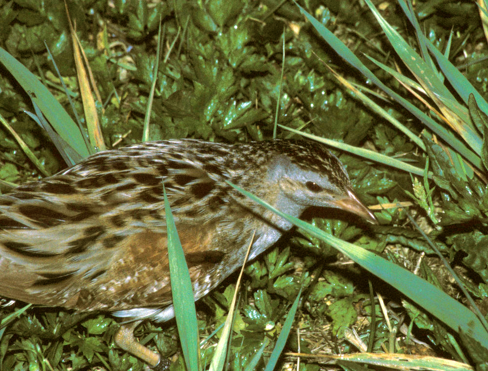 Crex crex